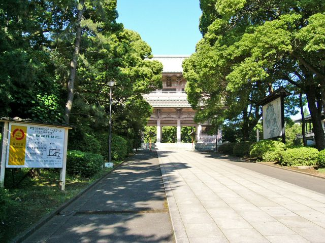 総持寺、三門（さんもん）